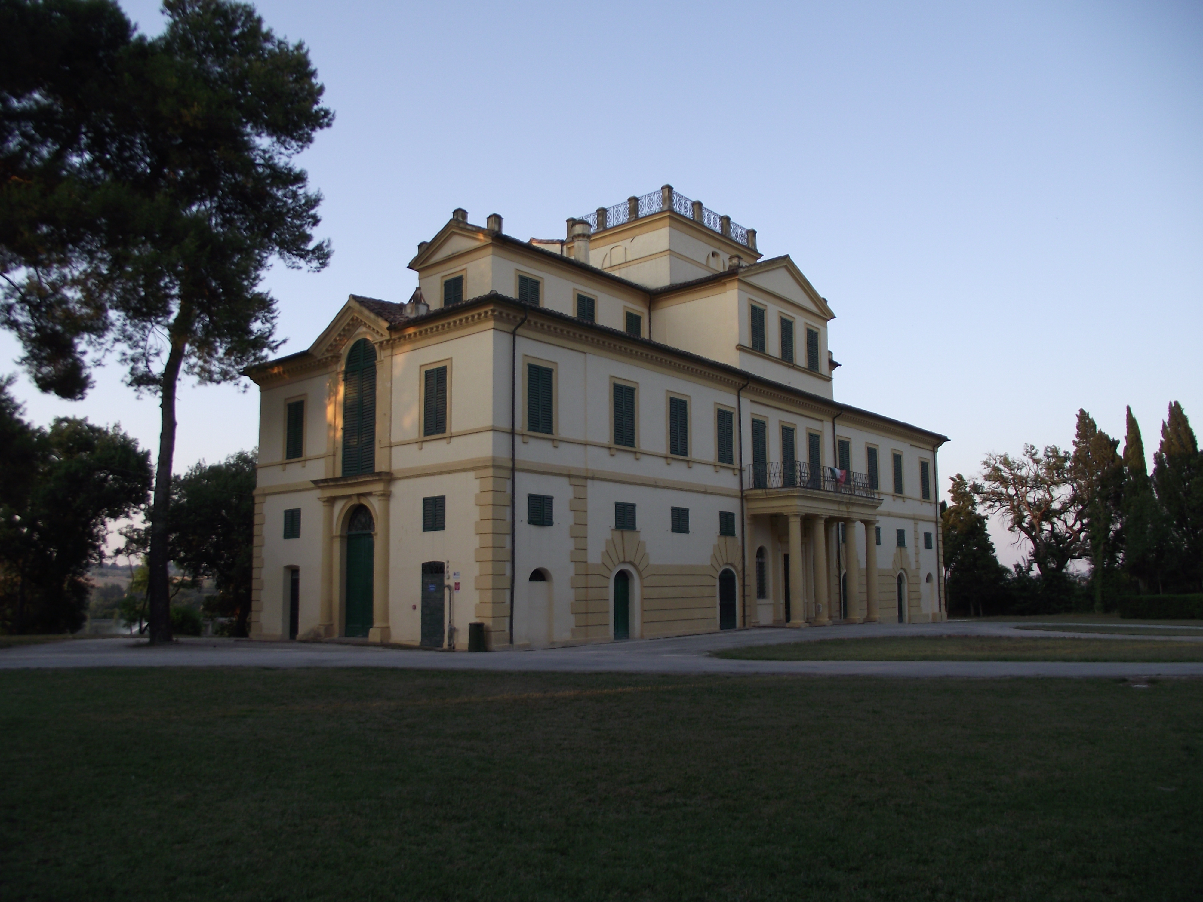 Pianello Vallesina, Villa Salvati, XVIII-XIX secolo